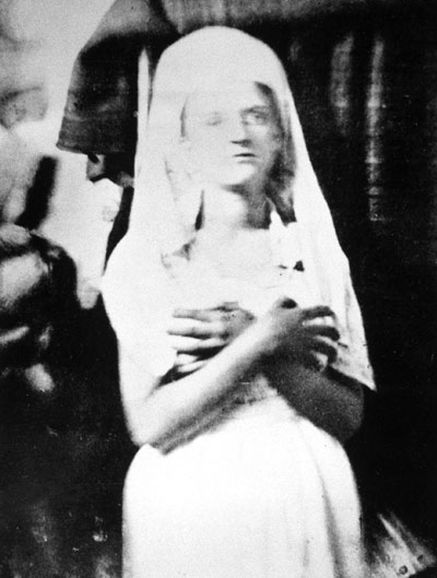 Katie King prise en photo par William Crookes pour ses «Notes of an Enquiry into the Phenomena called Spiritual during the Years 1870-1873.», Quarterly Journal of Science., janvier 1874.